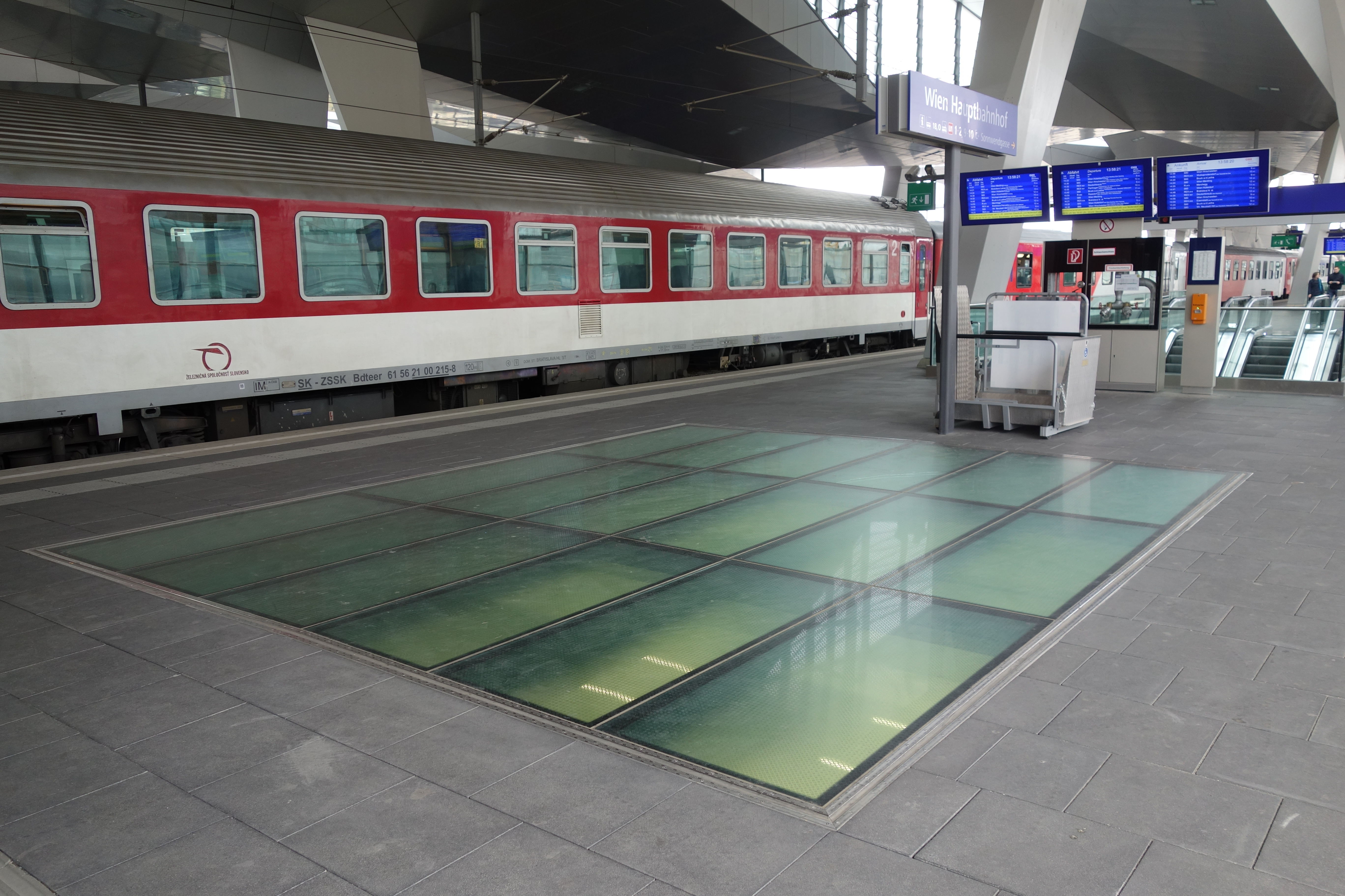 Bahnsteigebene des Wiener Hauptbahnhofs im Juni 2014. Das Bild zeigt eine der Tageslichtöffnungen im Boden, welche die Bereiche darunter belichten.